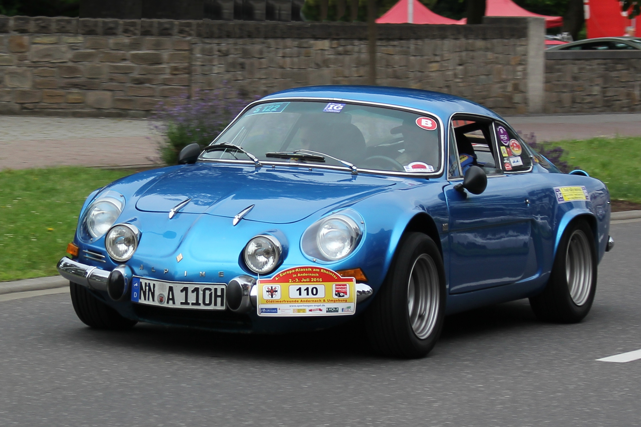 Renault Alpine A 110 – 1300 G, Bauzeit 1962 bis 1977, bei der Europa-Klassik Andernach (fiktives Kennzeichen)